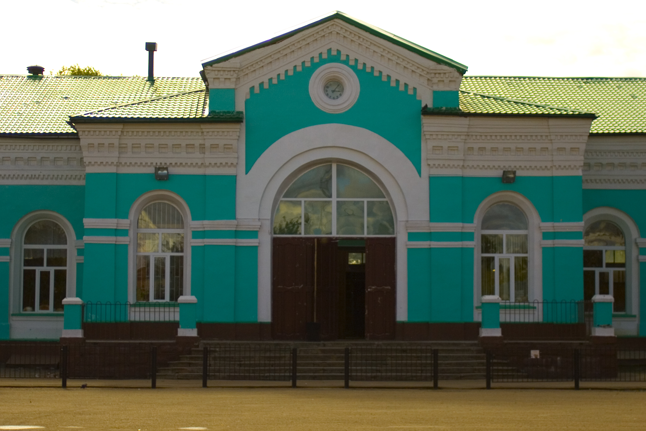 Вокзал в Рославле, центральная часть фасада здания ос стороны путей.